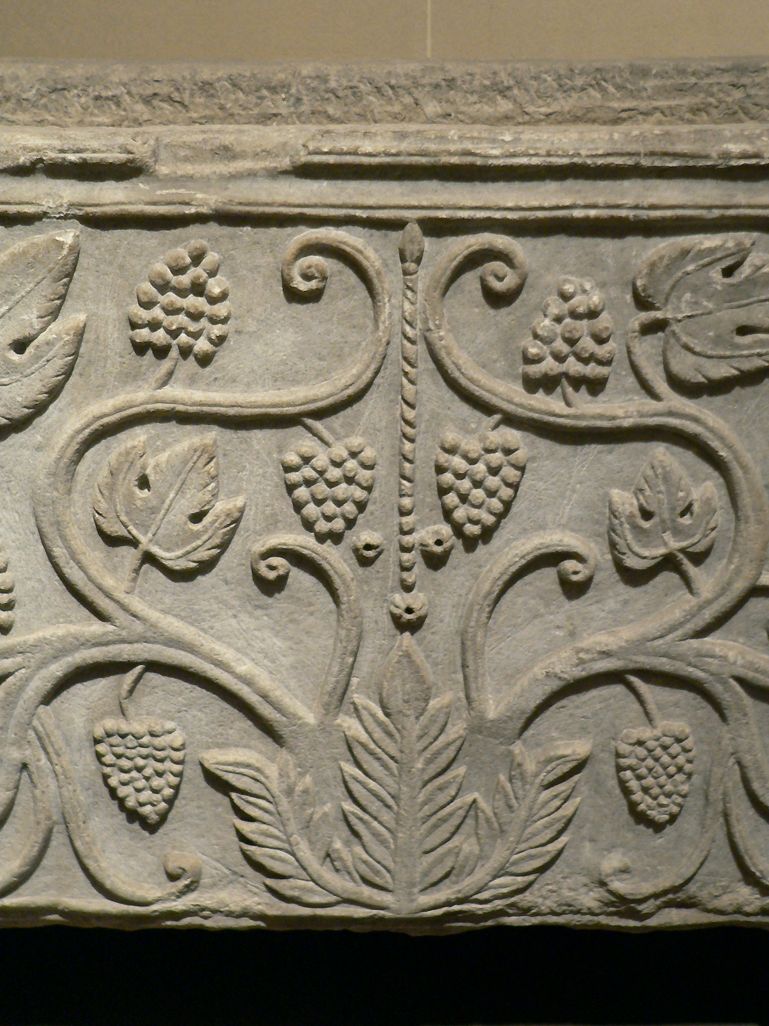 Sarcophage de Drausin, détail Cuve de sarcophage VI° siècle Marbre Provenance : Soissons L.: 2,12 m, l.: 0,76 m, H.: 0,53 m Décoré d'un chrisme et de pampres de vigne. Il aurait, selon la tradition, contenu le corps de Drausin ,évêque de Soissons, mort v. 680 Ma 2955 Musée du Louvre, Denon, Rez-de-Chaussée, salle 28. Photographe: Clio20